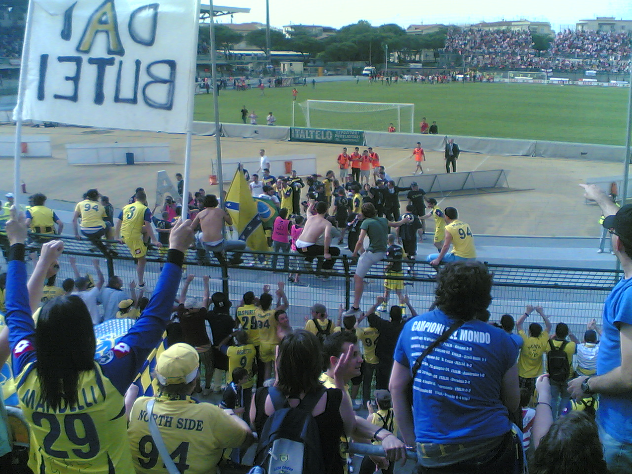 Grosseto (Italia), stadio Carlo Zecchini, 25 maggio 2008. U.S. Grosseto F.C. — A.C. ChievoVerona 1-1, 41ª giornata del campionato italiano di Serie B 2007-08: al termine della sfida, i tifosi del ChievoVerona festeggiano la squadra dopo la matematica promozione in Serie A.